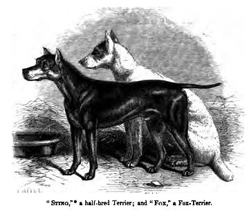 Half-bred terrier and fox terrier